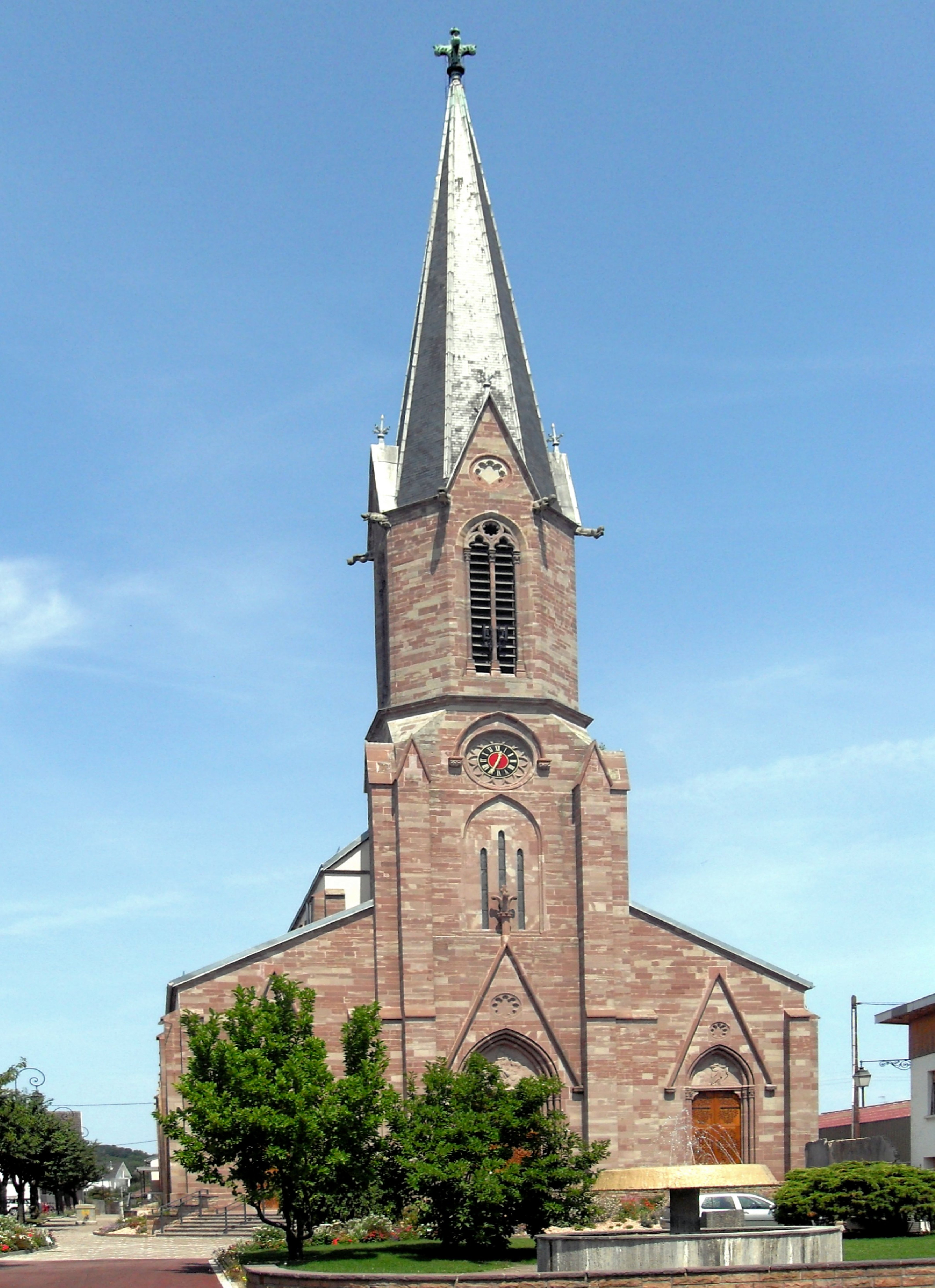 L'église Saint-Léger à Blotzheim